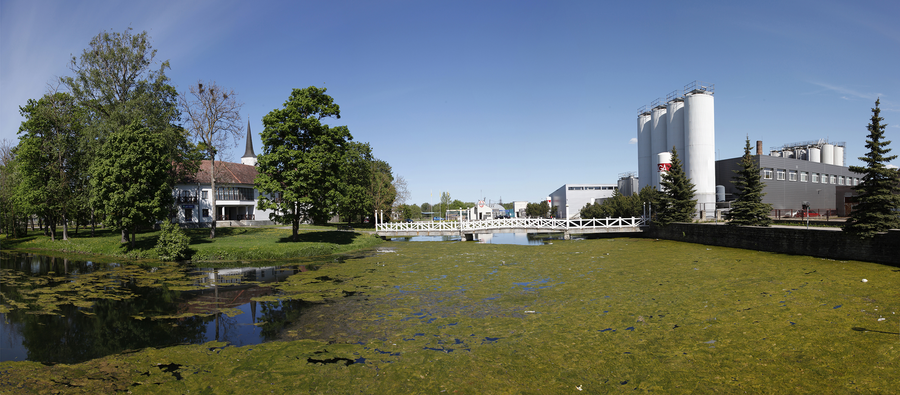 Haljala aleviku teenuskeskus 25.05.09